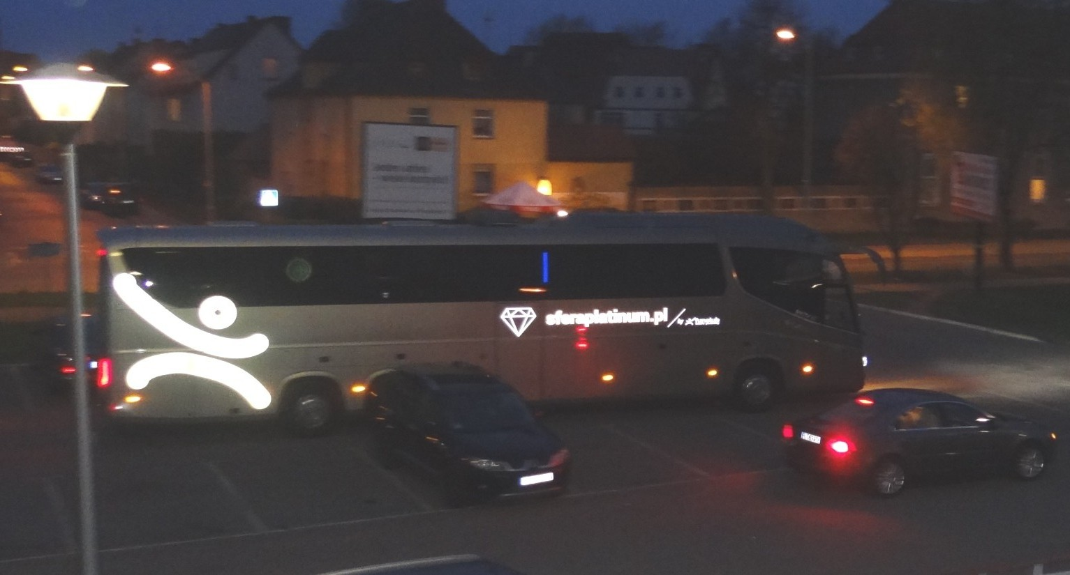 Basket Poznań, 15.04.2018